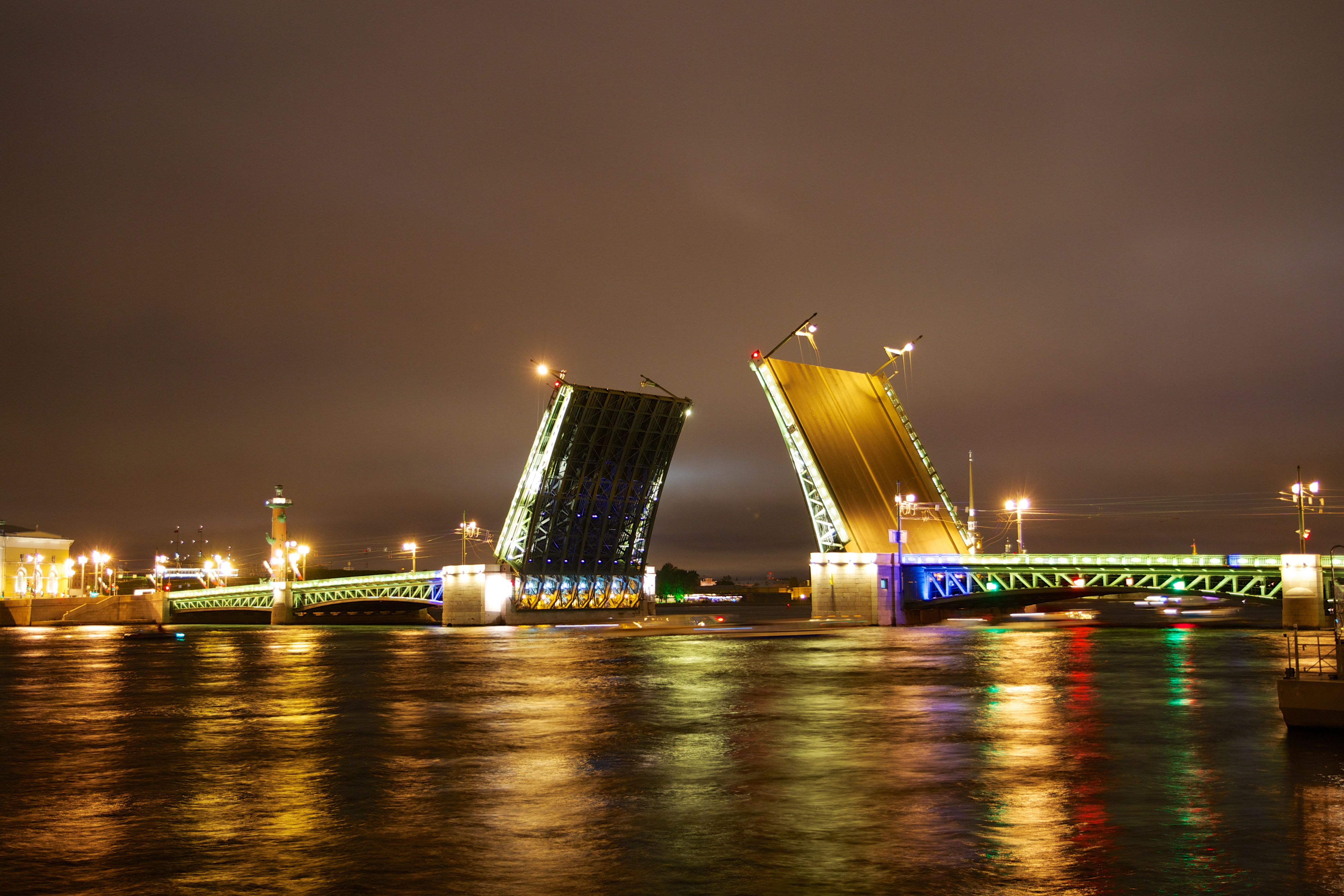 Schlossbrücke (Дворцовый мост), Sankt Petersburg Kurz nach der Öffnung um 01:35 Uhr.